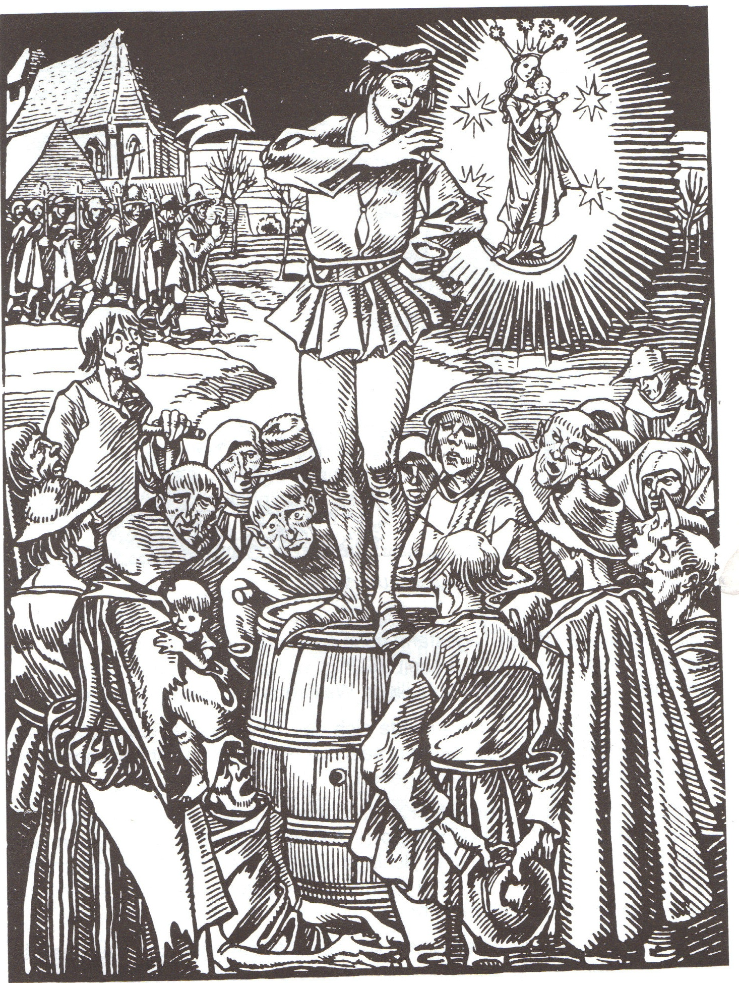 Pfeifer von Niklashausen